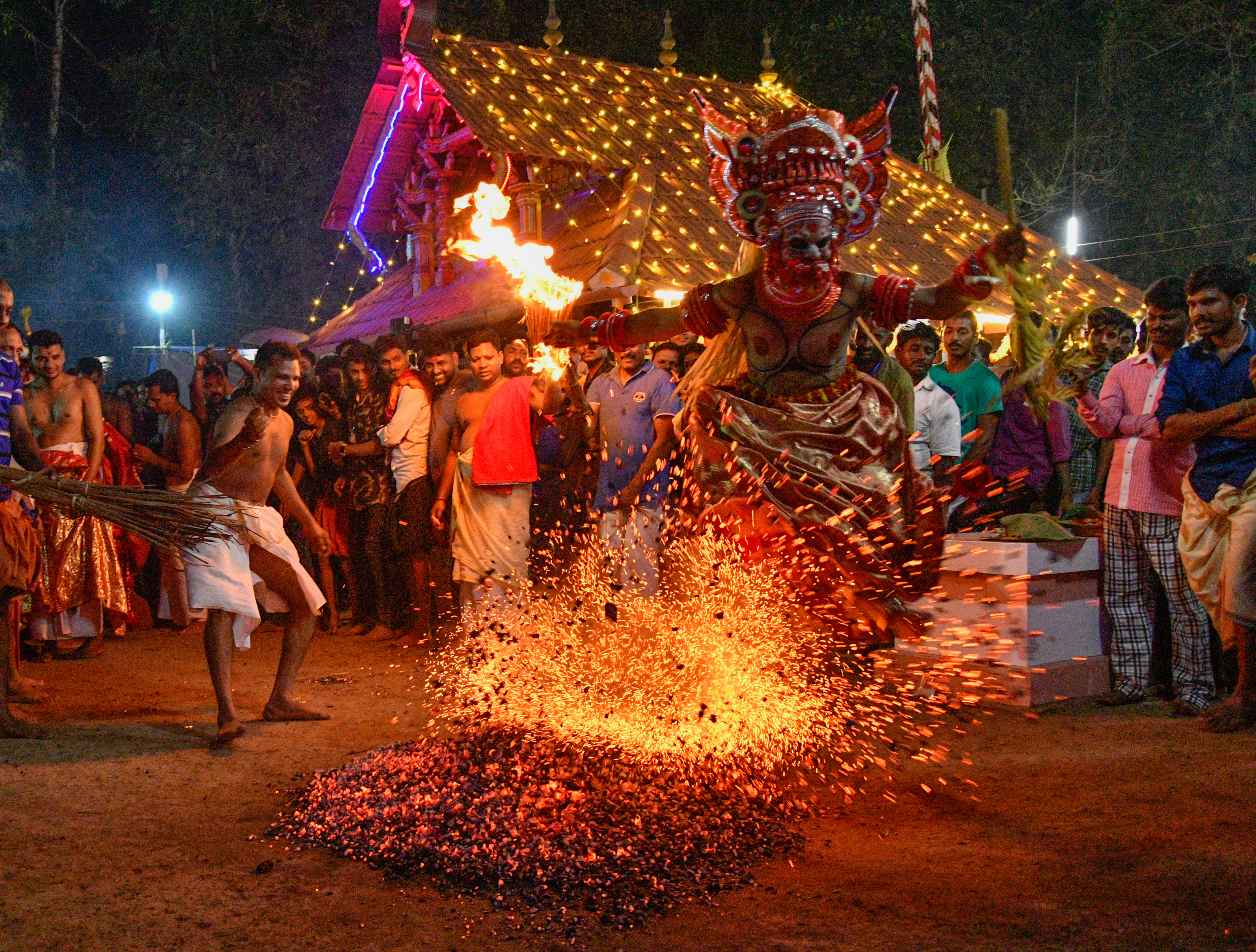 Bappiriyan Theyyam at Muzhappilangad